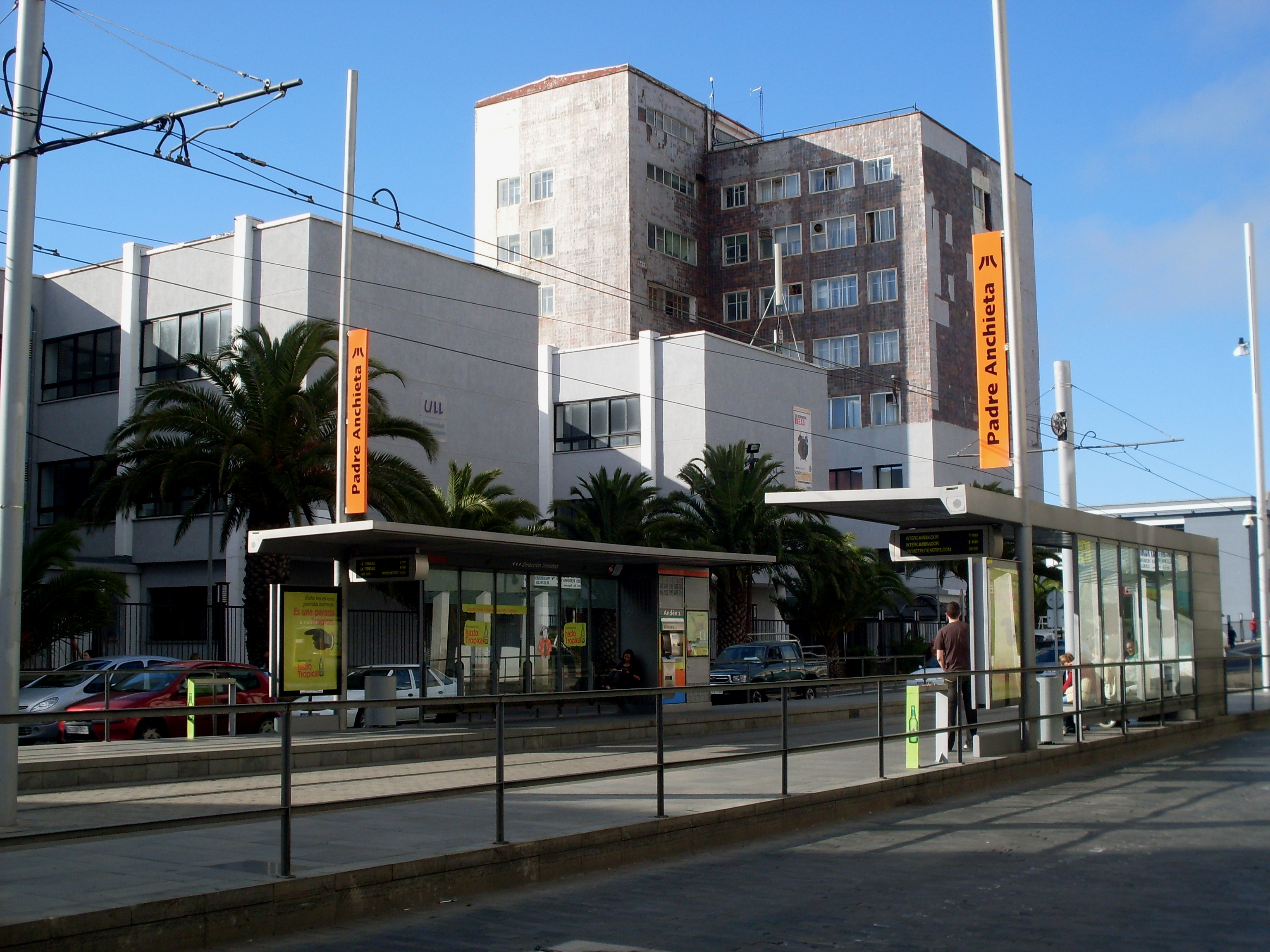 Imagen de la parada "Padre Anchieta" del Tranvía de Tenerife (Antigua ubicación de la parada de Padre Anchieta en la Avenida de La Trinidad).